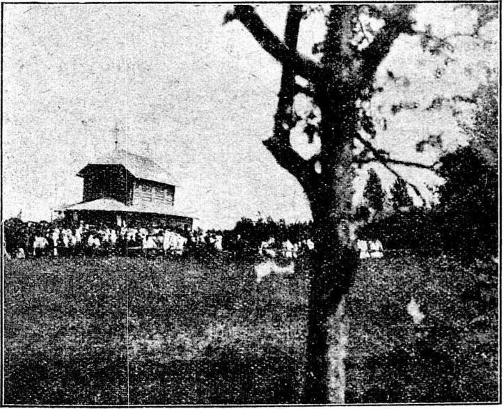 Беларуская (тарашкевіца): Дубок (Dubok), Курган (Kurhan). Капліца